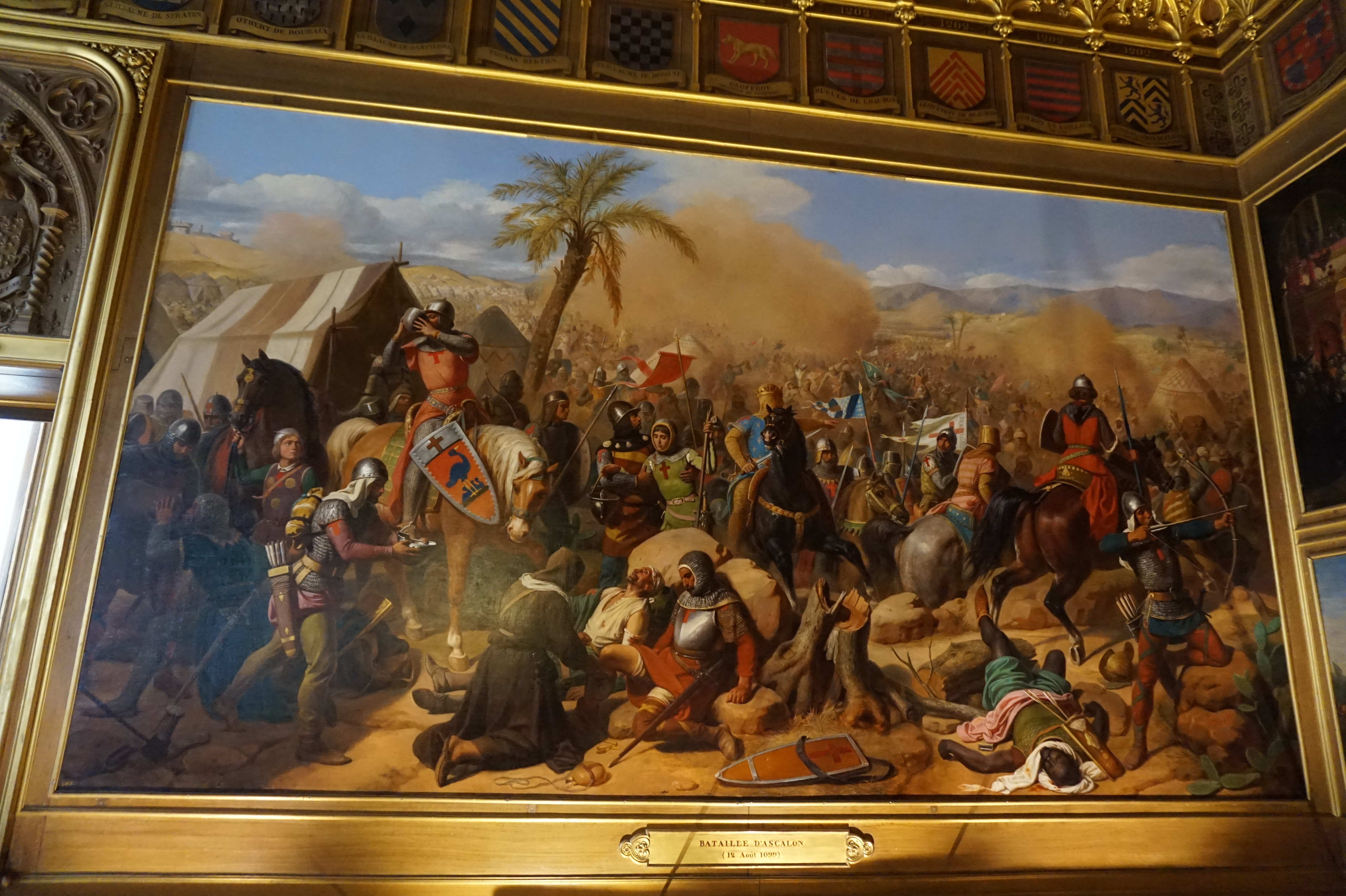 1099-08-12 Bataille d'Ascalon. Salles des Croisades, château de Versailles.